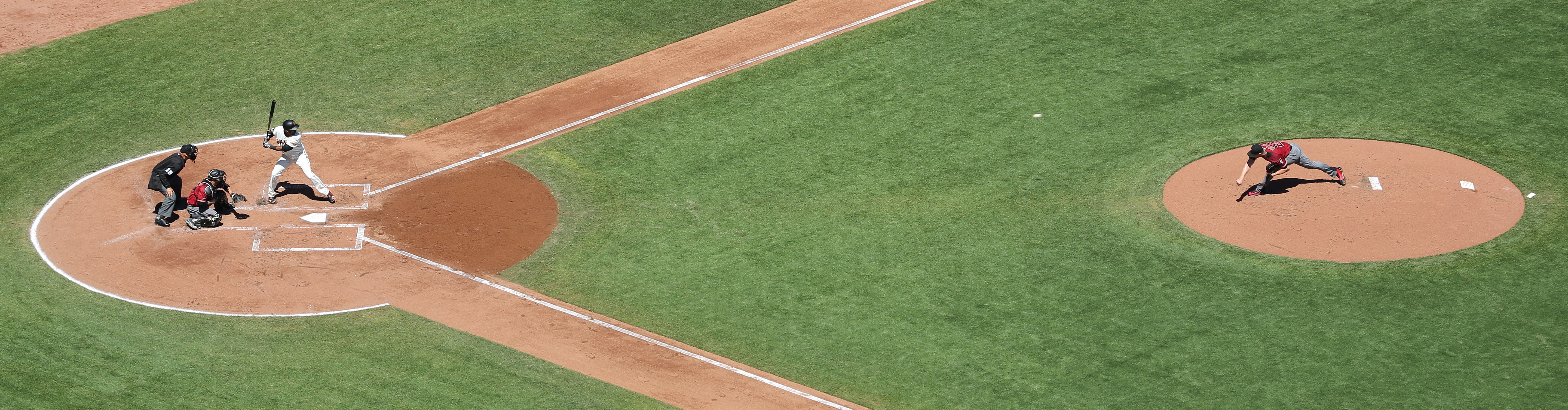 Baseball at AT&T Park (TK9)